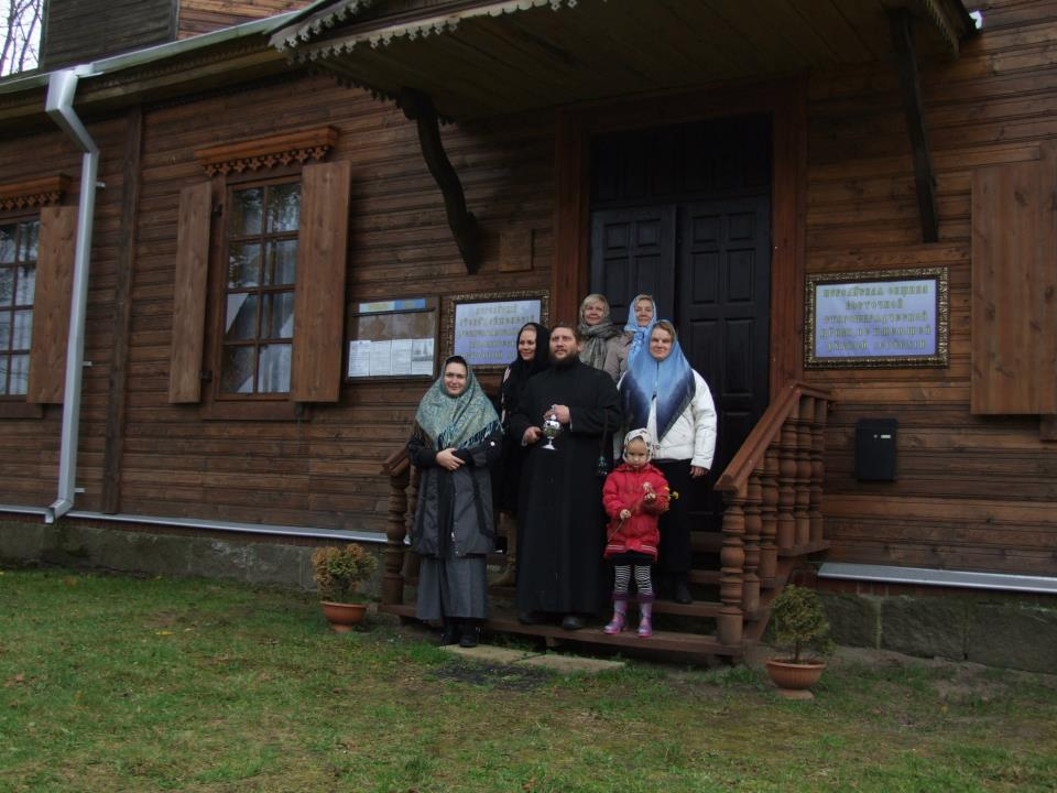 Покров Пресвятой Богородицы, 2012 год